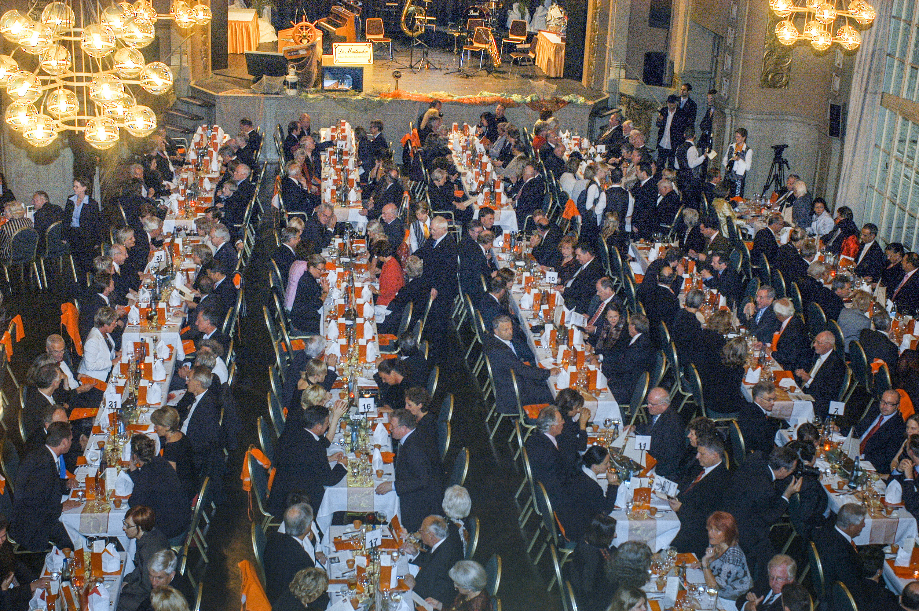 Aalkönigsfest Bad Honnef im Kurhaus